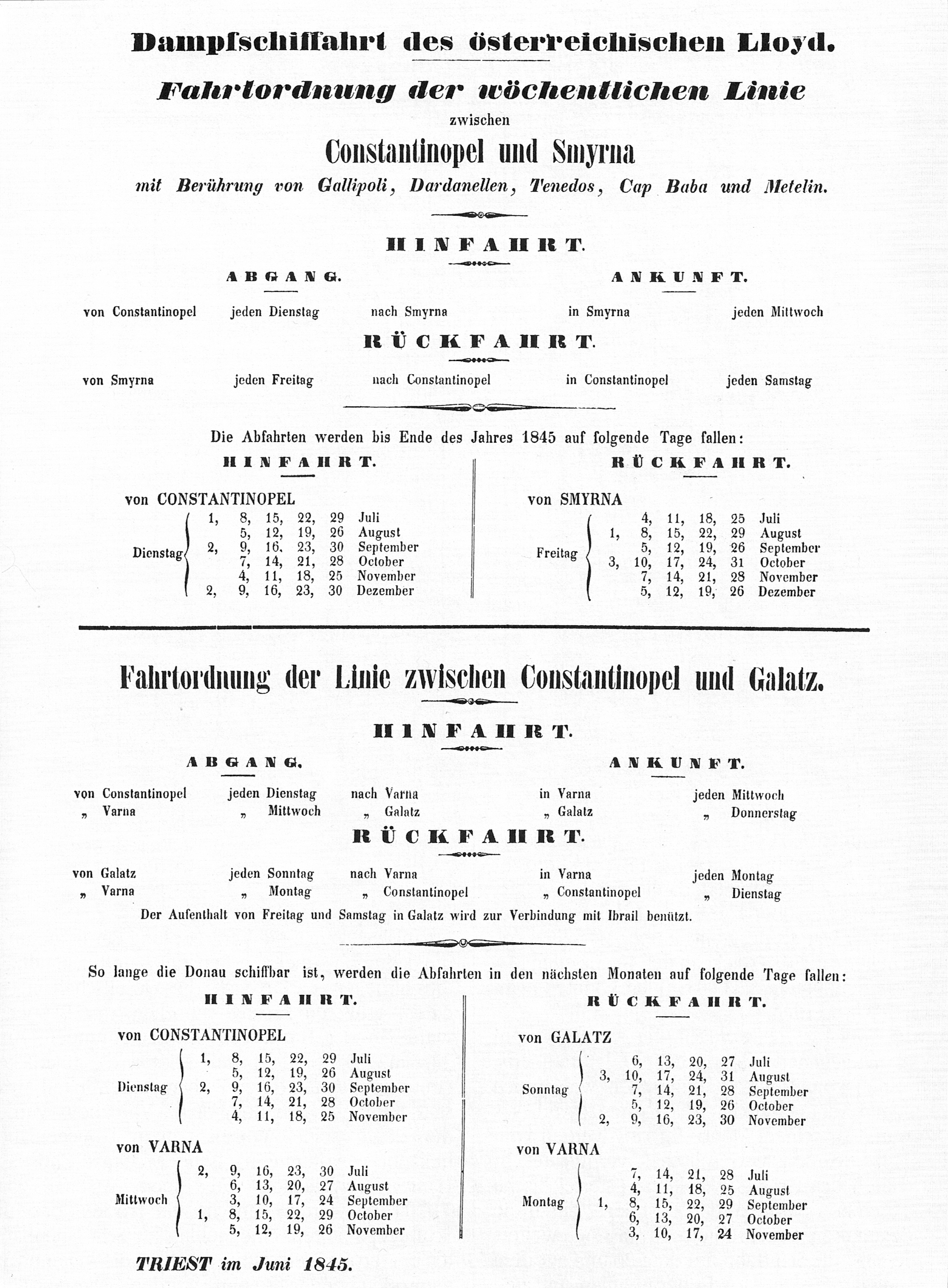 Fahrplan des Österreichischen Lloyd auf dem Jahre 1845 für die Linie Konstantinopel - Smyrna und Konstantinopel - Galatz.